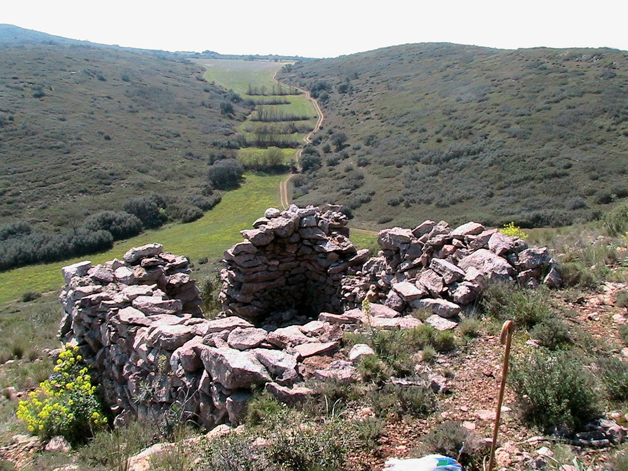 Altiplans de la Serra Carbonera des del Tossal de Sant Jordi, amb restes de niu de metralladores a primer terme. A Camarasa (Noguera - Catalunya)